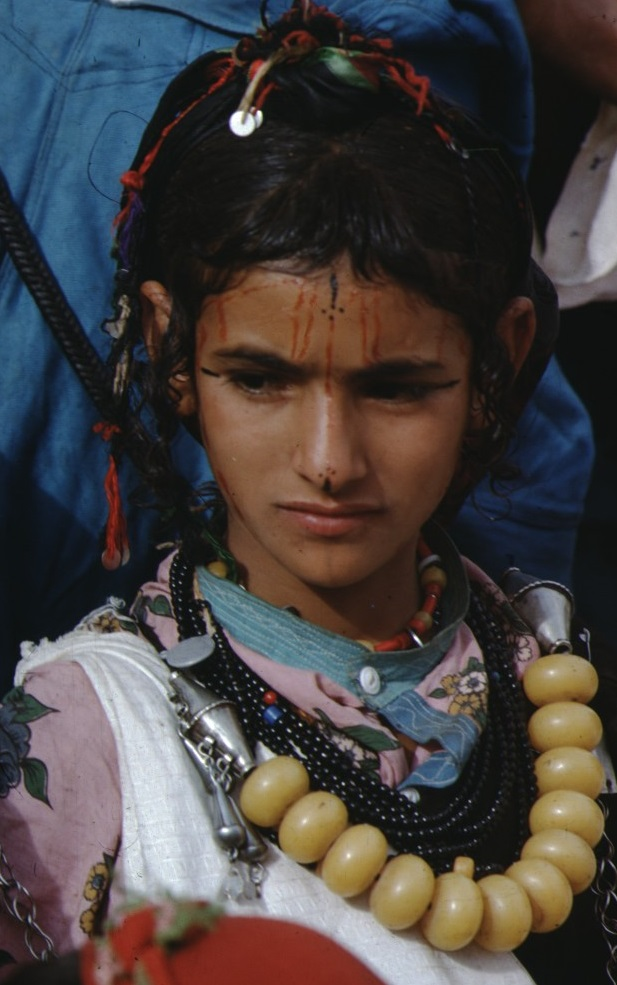 Fillette Maroc population berbère, Photo de Jean-Maurice et Françoise CART 1964 utilisée pour publication d'Air-France